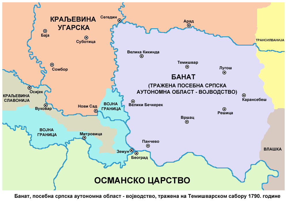 Banat, a separate Serb autonomous oblast - voivodeship, demanded at the Temeschwar assembly in 1790. Банат, посебна српска аутономна област - војводство, тражена на Темишварском сабору 1790. године.